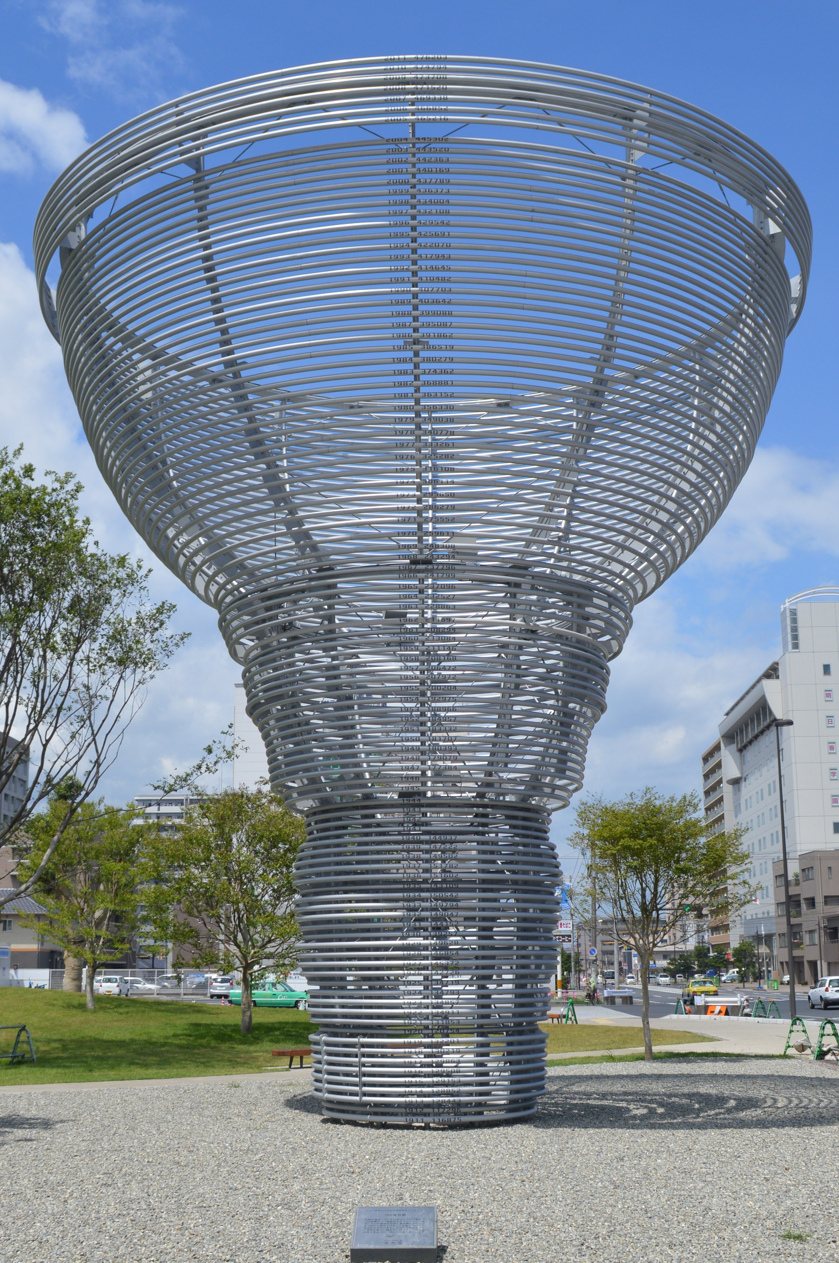 大分駅南口にあるモニュメント「100年の樹」